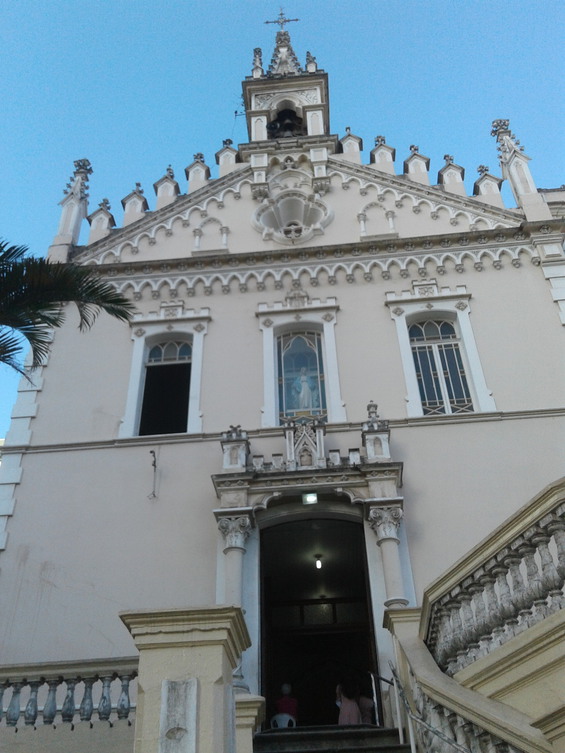 Monumento fotografado em uma visita ao centro histórico da cidade de Vitória.